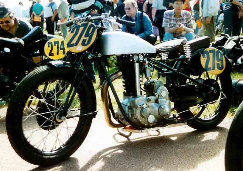 FN 500 cc Racer 1932